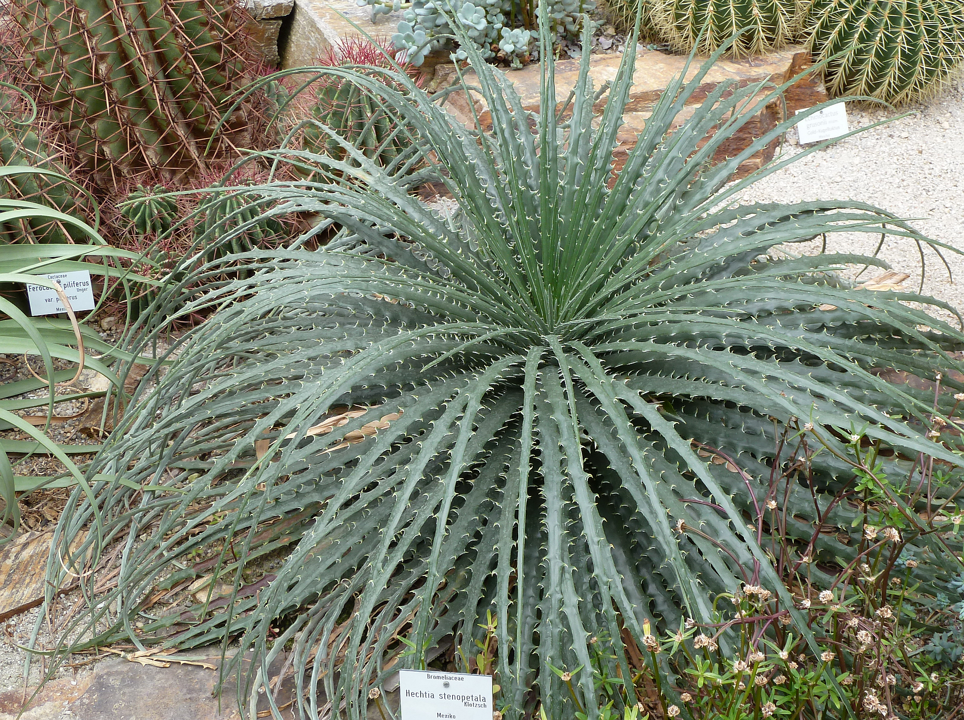 Hechtia stenopetala, Botanischer Garten München-Nymphenburg, Munich, Germany